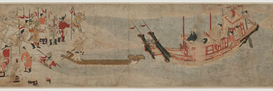 Rouleau 1, arrivée en Chine du ministre japonais Kibi.